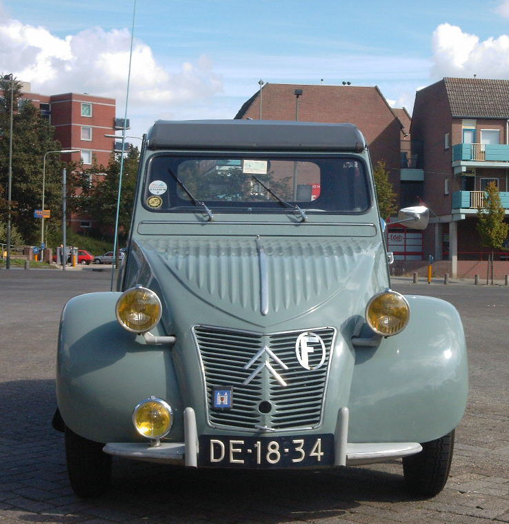 Citroën 2 CV, Baujahr 1957 (laut Beschriftung), in Kerkrade